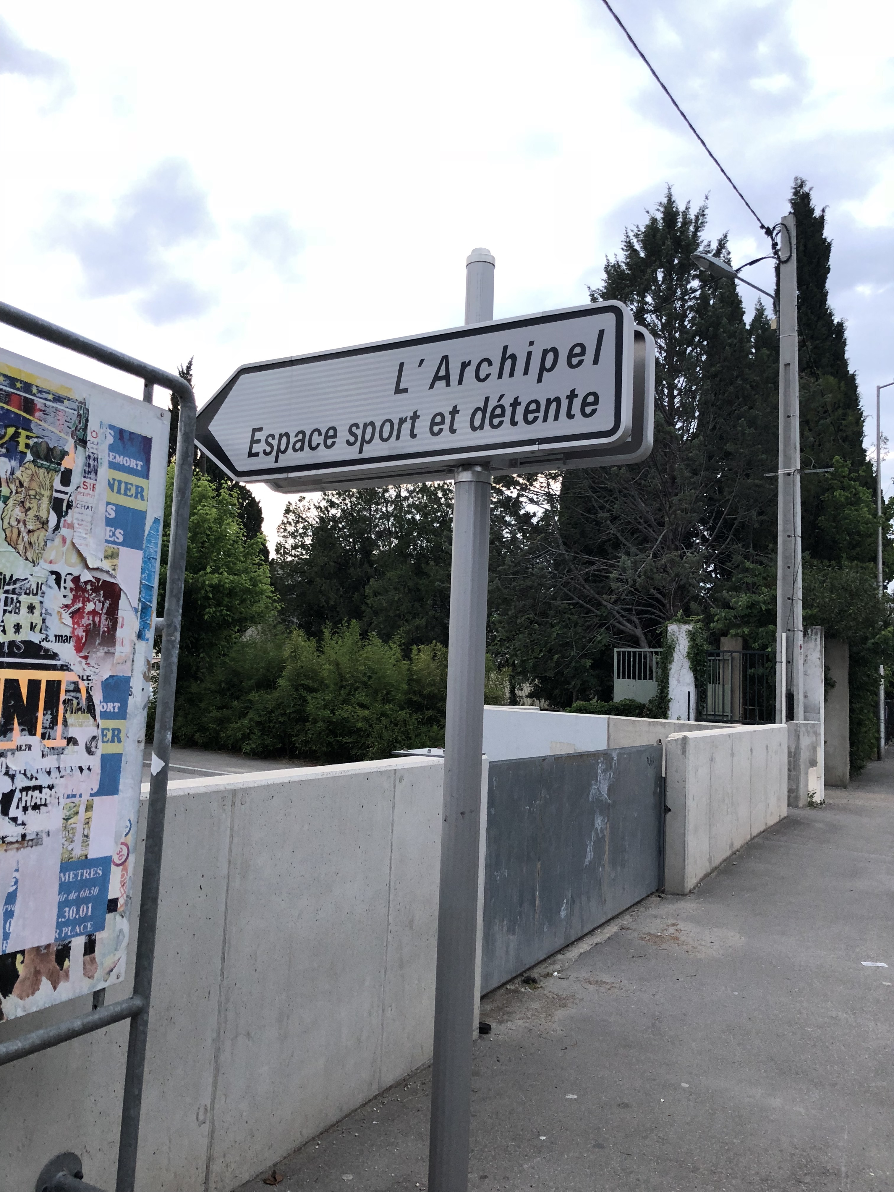 signalisation du GOSL, espace Francesco Barron dans le quatier des Canourgues à Salon de Provence